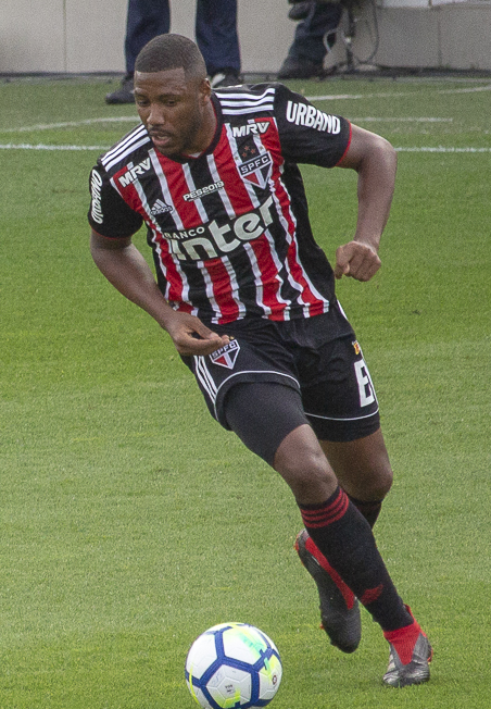 Foto: Douglas Teixeira/Futebol Santista